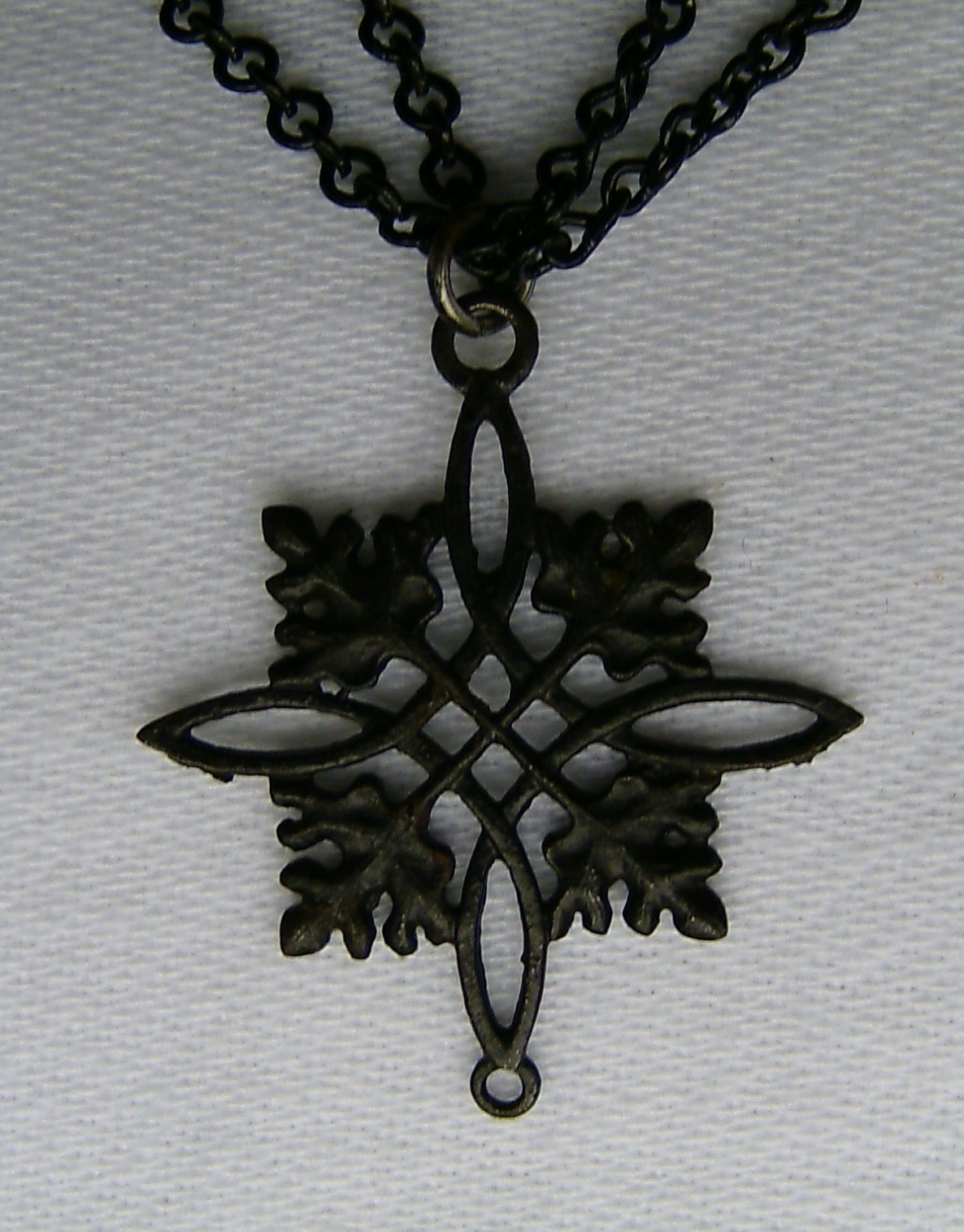 Conrad Geiß, Halsketten-Anhänger aus der Werkstatt von Conrad Geiß, Maß des inneren Blattornaments: 15x15 mm, Maximale Länge: 25 mm